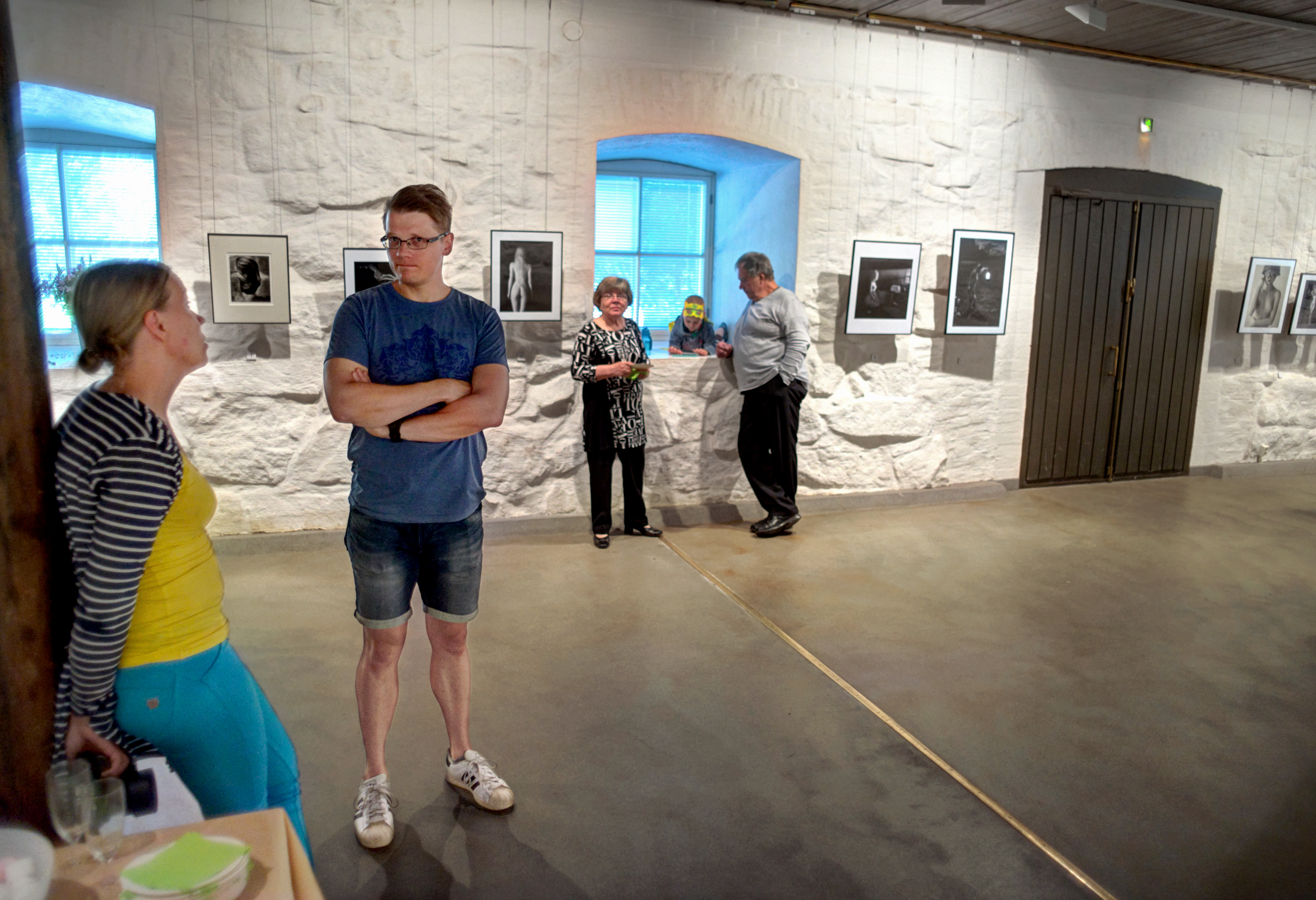 Saimaan Kameraseuran näyttely Kaakkois-Suomen Valokuvakeskuksen Galleria Pihatossa,avajaiset 4.7.2017